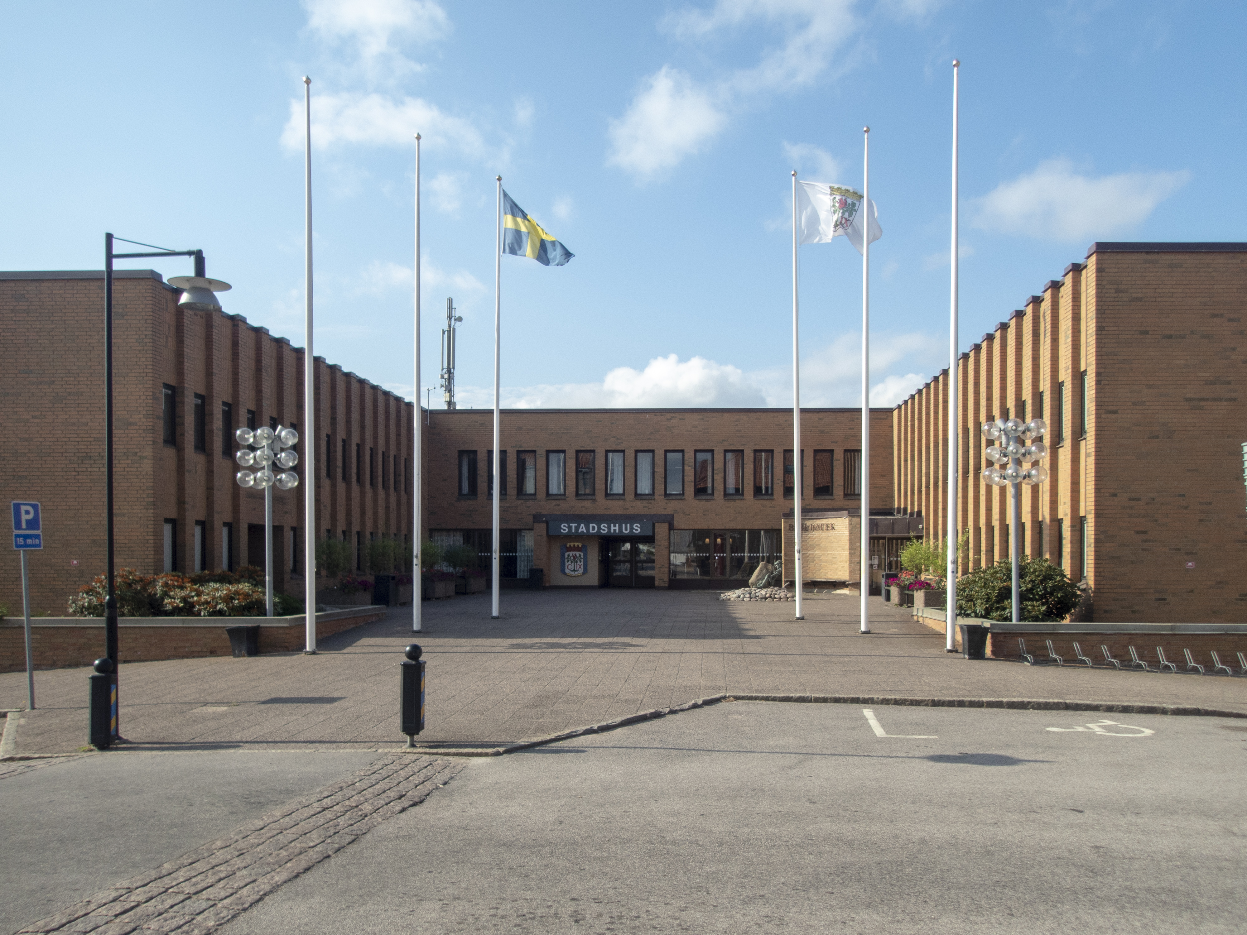 Stadshuset, Vimmerby. Invigt 1976